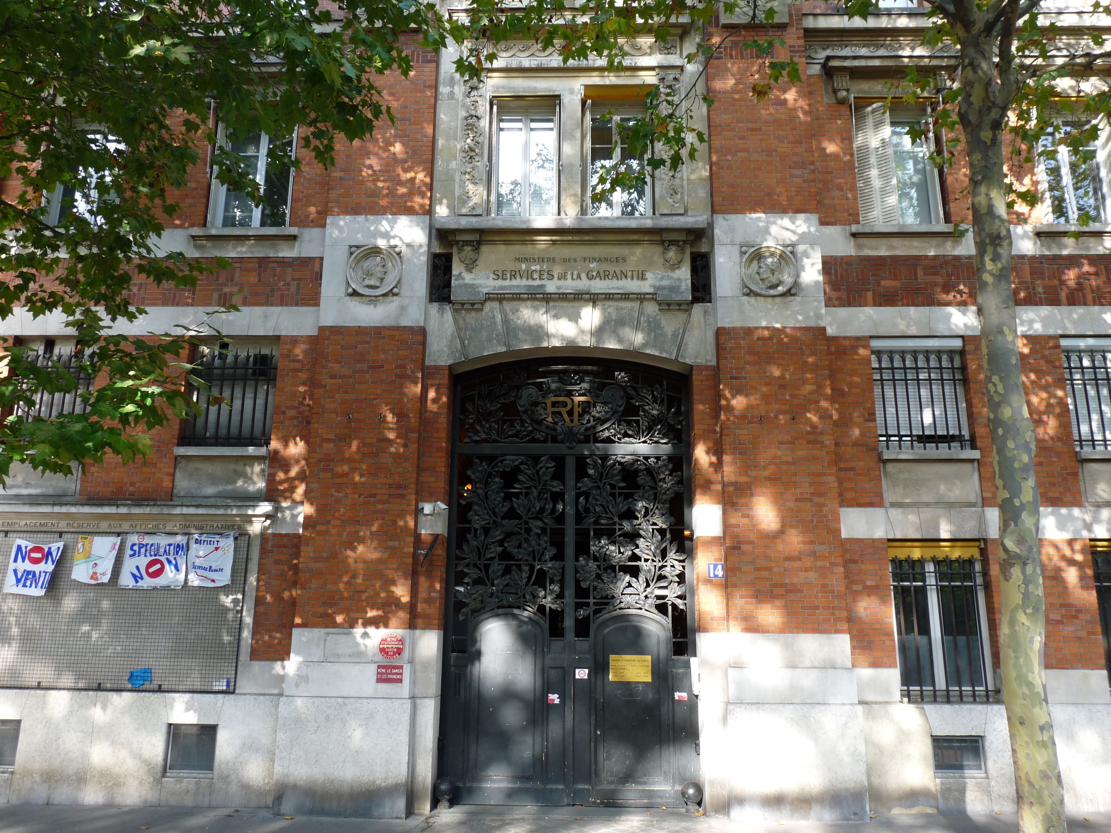 Le service de la garantie, rue Perrée à Paris